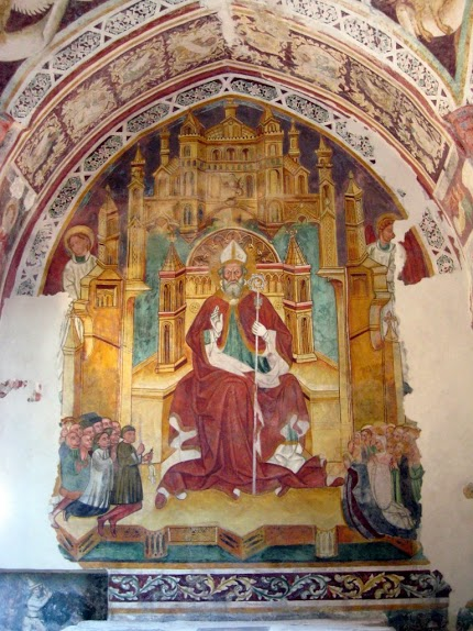 Cividale del Friuli - Chiesa S.Biagio - San Biagio in trono affresco